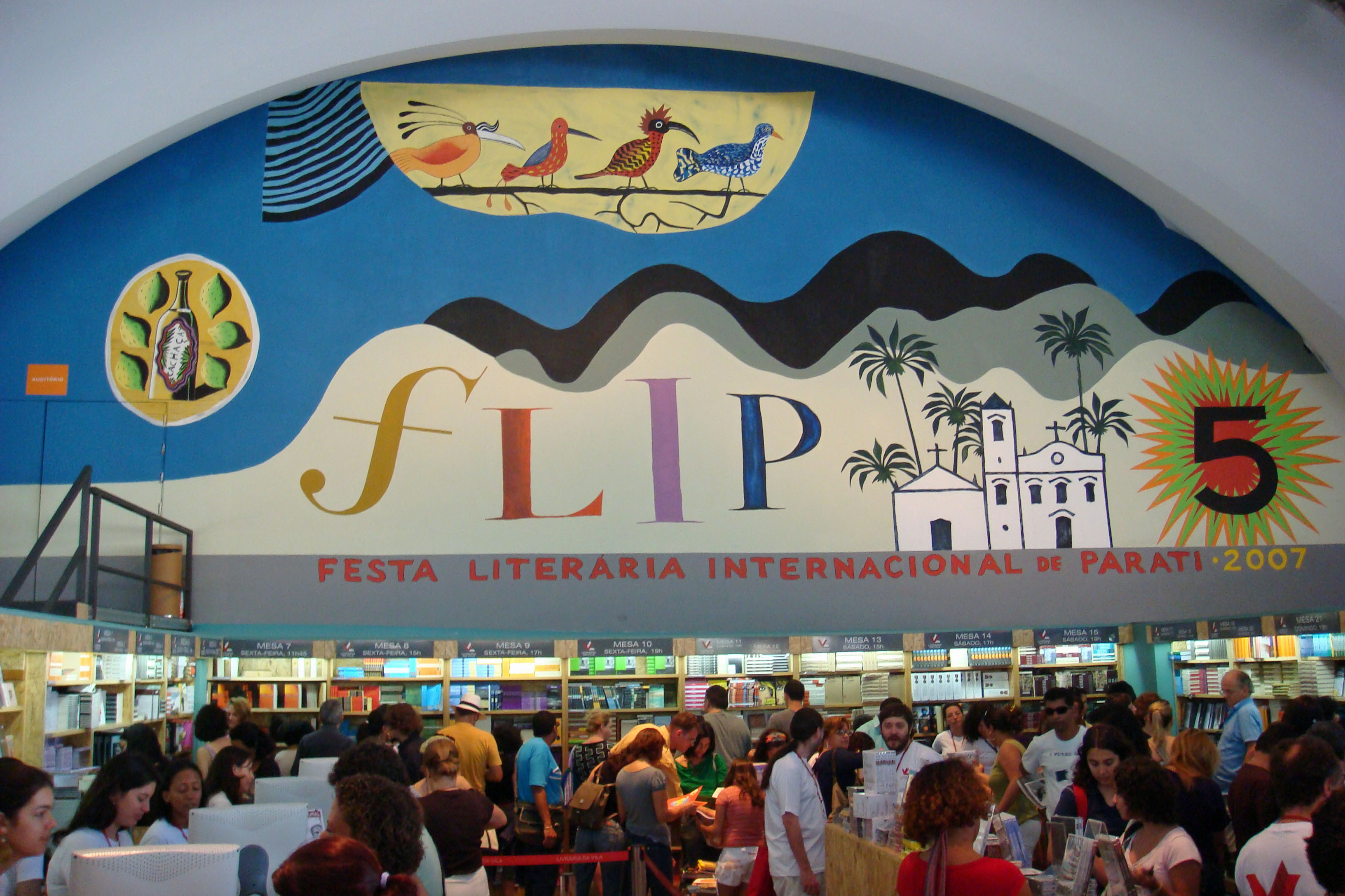 Quinta Festa Literária Internacional de Paraty - FLIP 2007